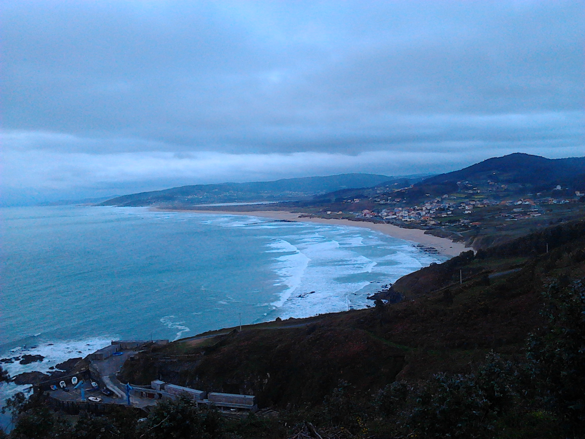 Vista panorámica da praia de Razo, Carballo